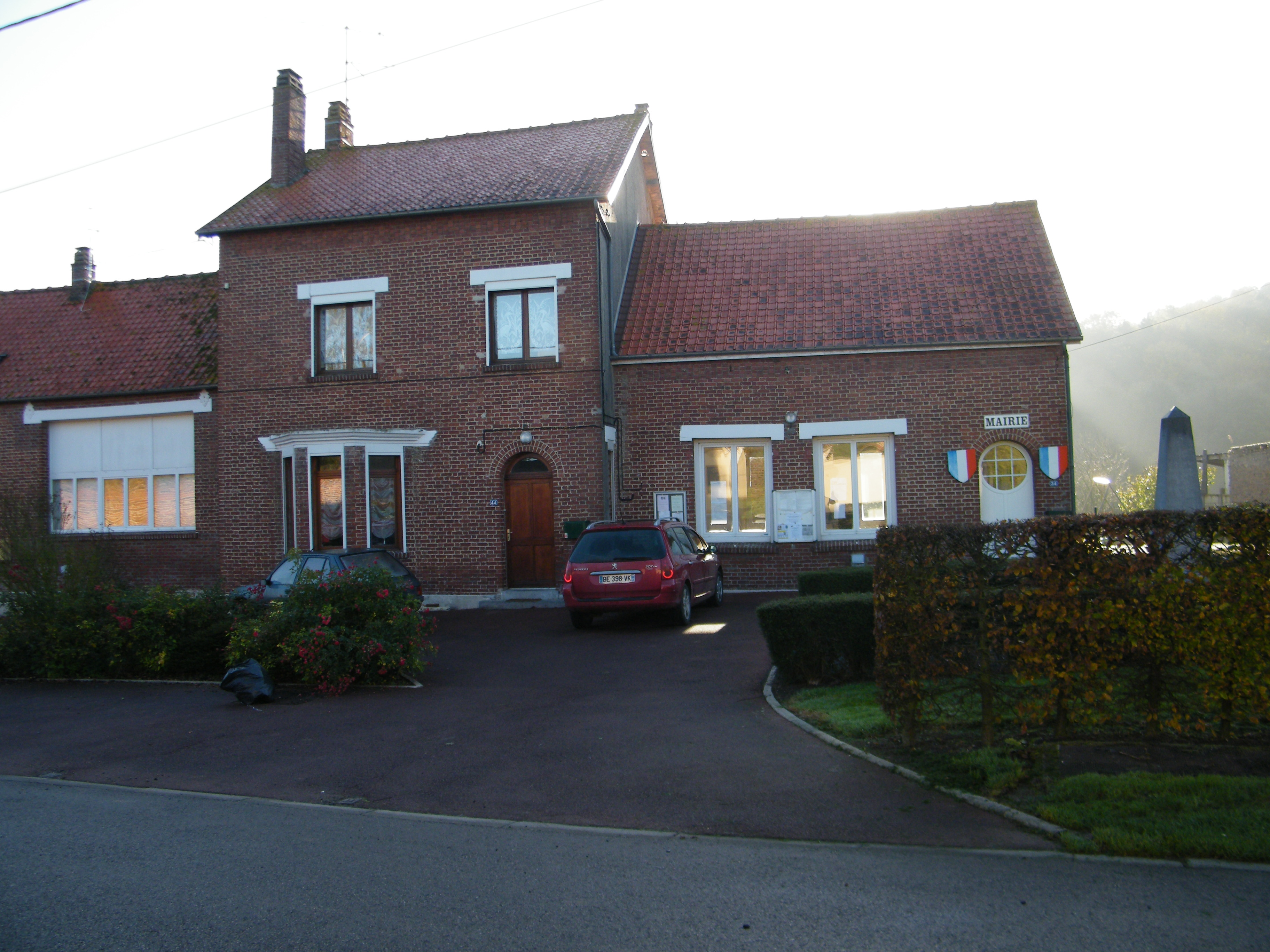 Mairie-école.